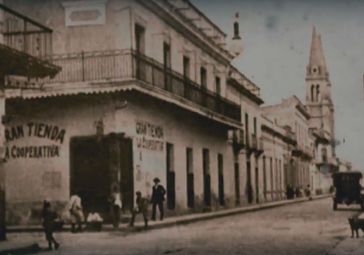 Casa de Leguizamón en Salta c. 1910